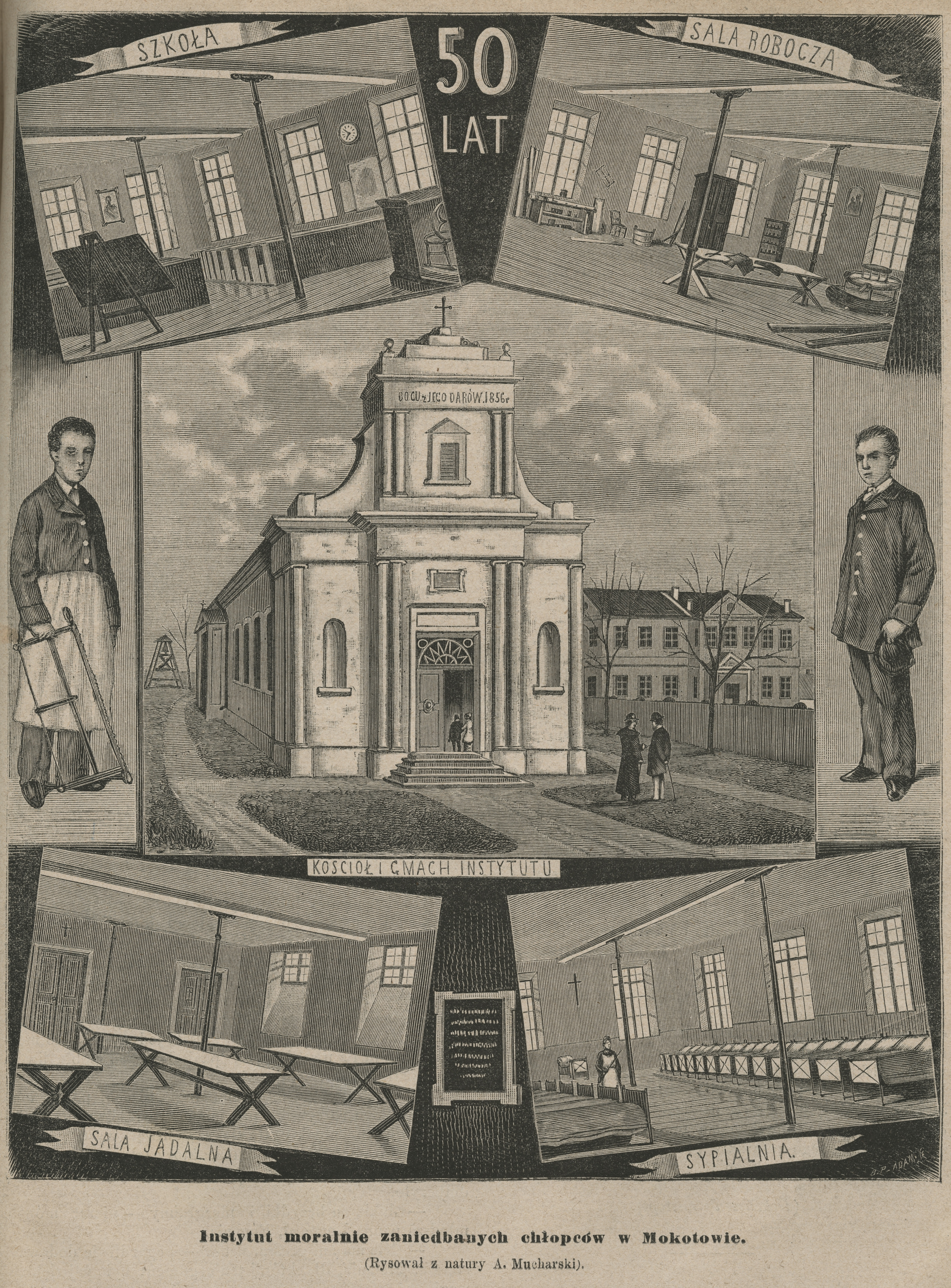 Instytut moralnie zaniedbanych chłopców w Mokotowie